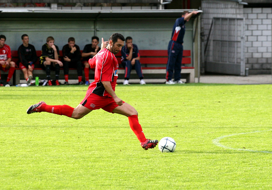 FC Biel gegen FC Konolfingen (Harutyun Vardanyan)